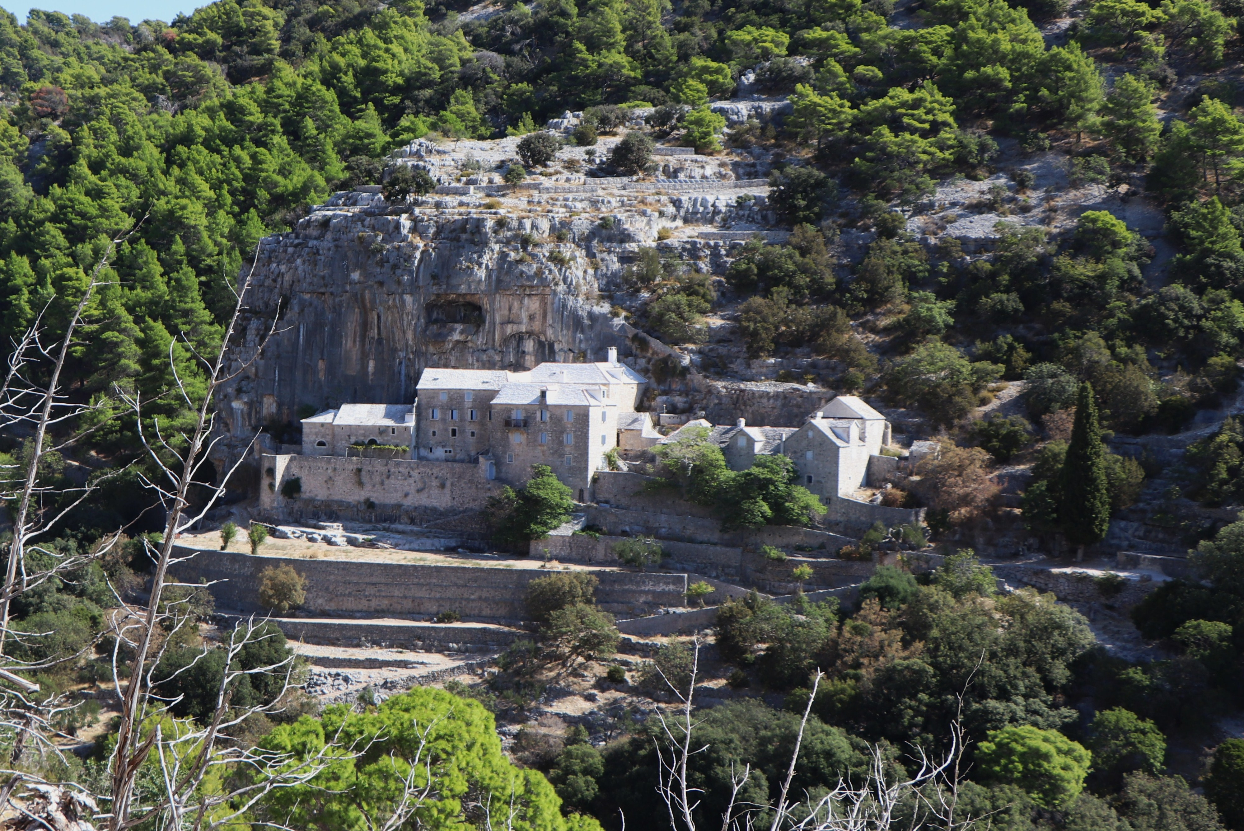 Ermitage de Blaca, île de Brac, Dalmatie, Croatie